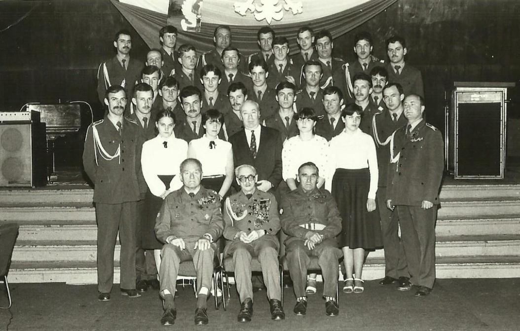 Garnizon Stargard Szczeciński, 1989r. Orkiestra podczas koncertu w Klubie Garnizonowym z okazji 9 maja